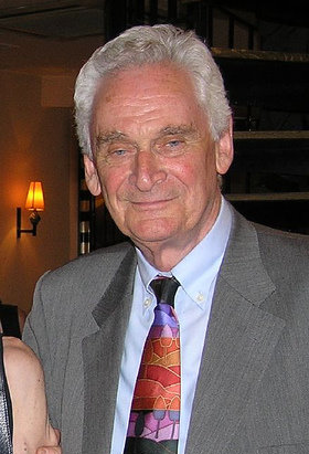 John McNeill, Barbara Pickersgill, Vernon Heywood